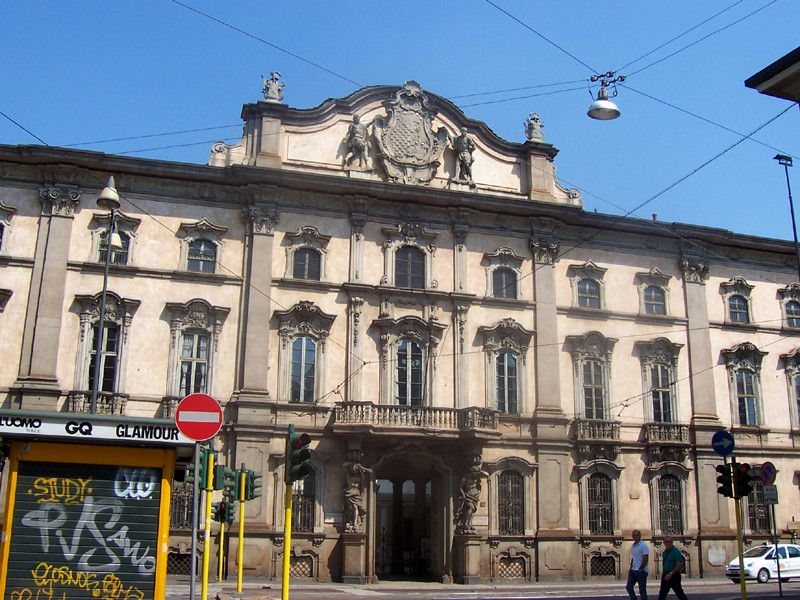 Palazzo Litta a Milano